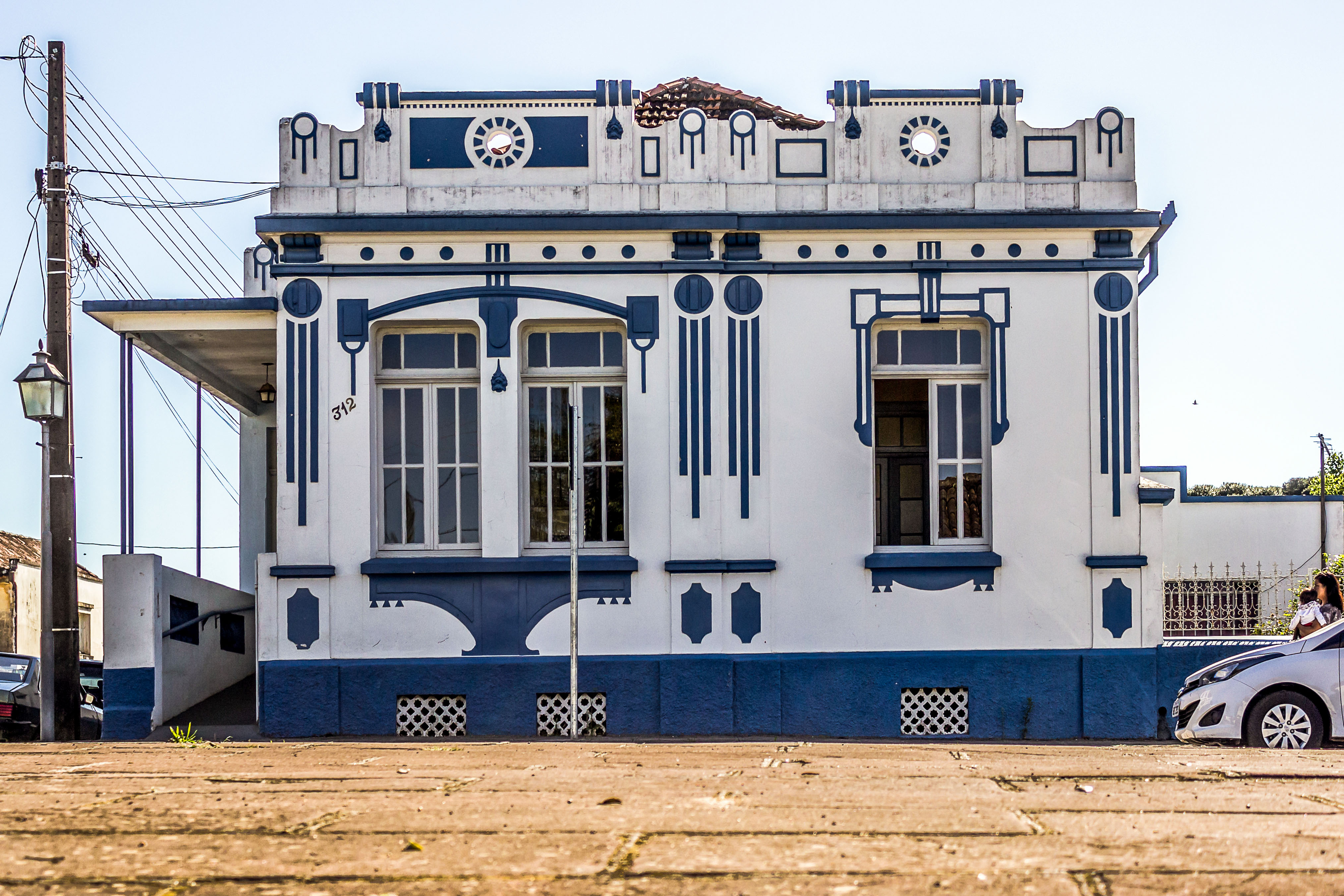 Lapa, PR: conjunto arquitetônico e paisagístico